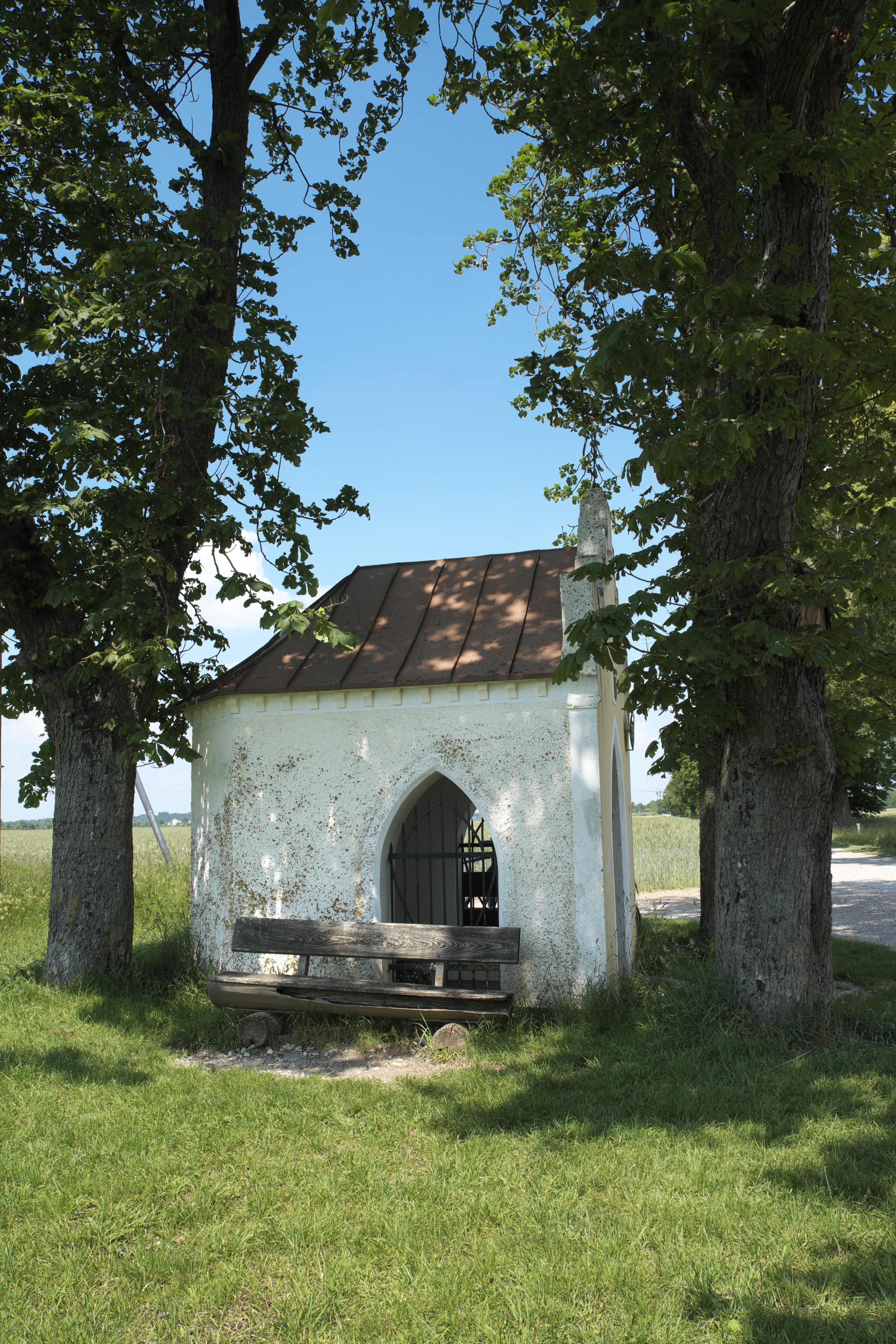 Marienkapelle in Streiflach, einem Stadtteil von Germering im Landkreis München (Bayern/Deutschland)